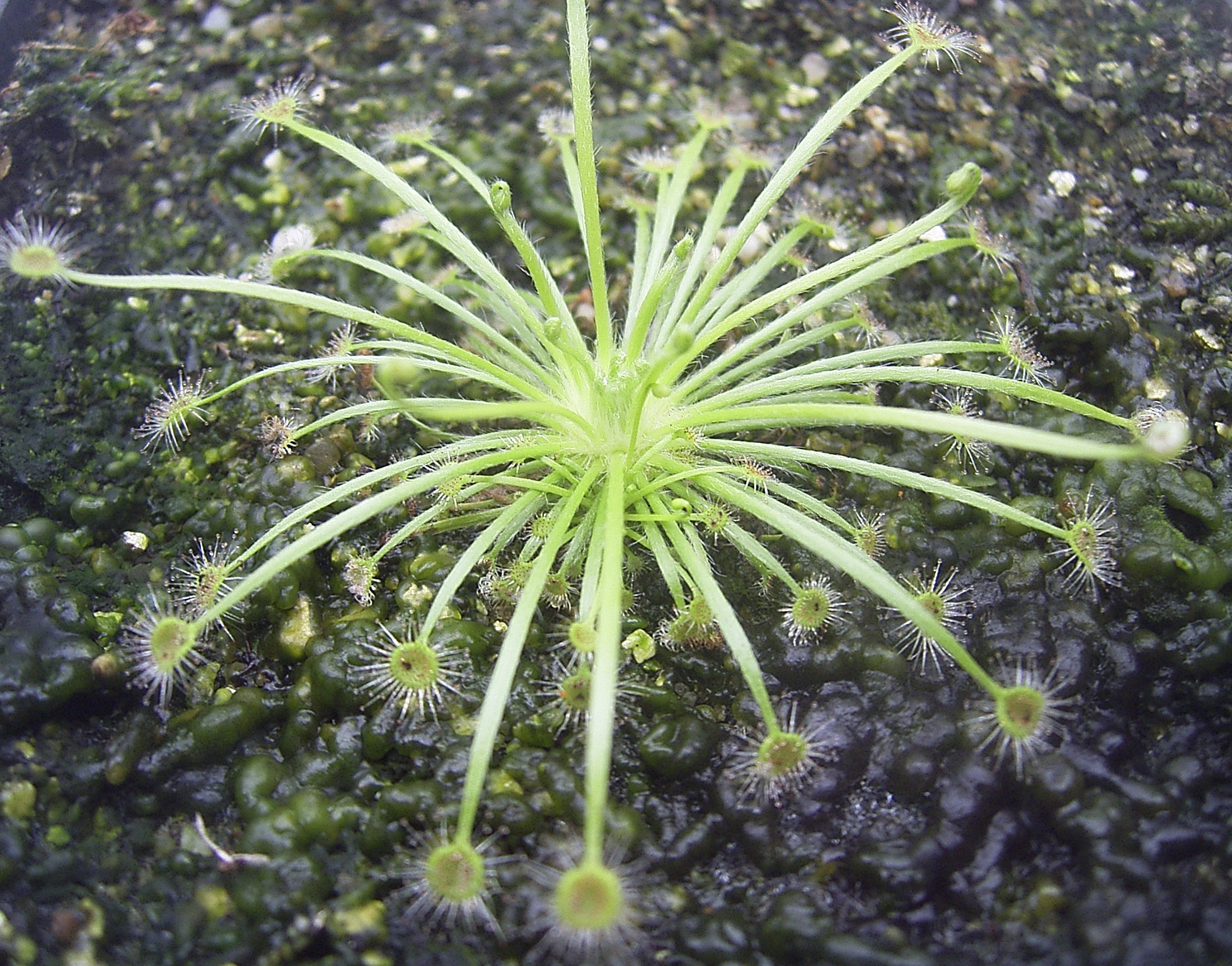 Habitus Drosera broomensis